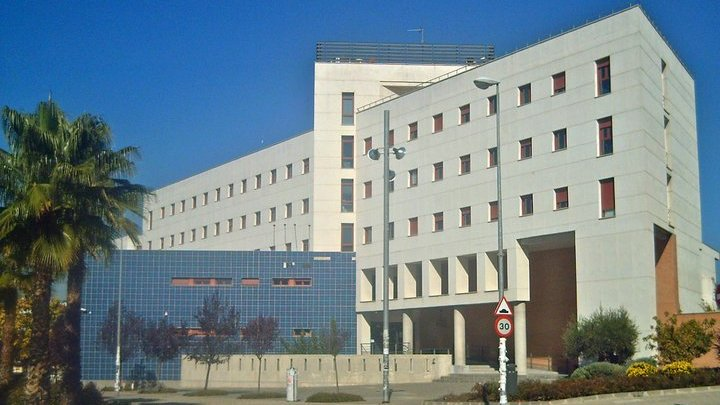 Fachada de la Escuela Superior de Ingenierías Informática y de Telecomunicación (ETSIIT) de la Universidad de Granada.